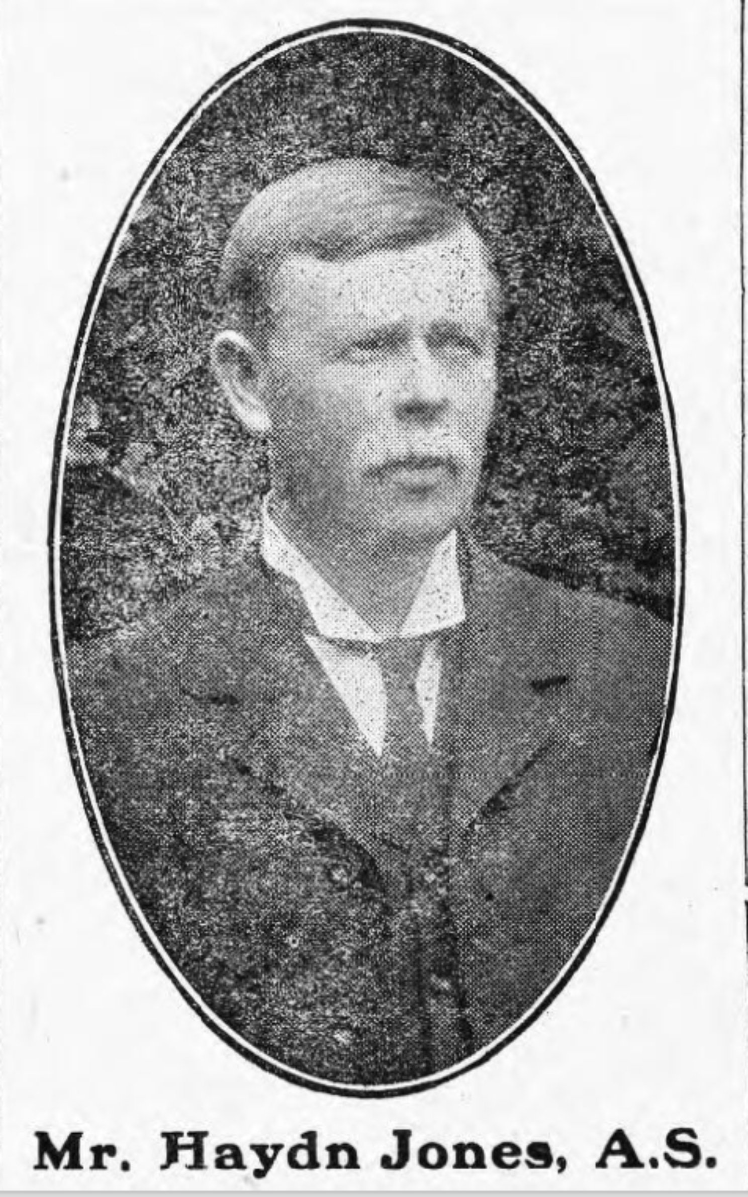 Henry Haydn Jones AS (1910)